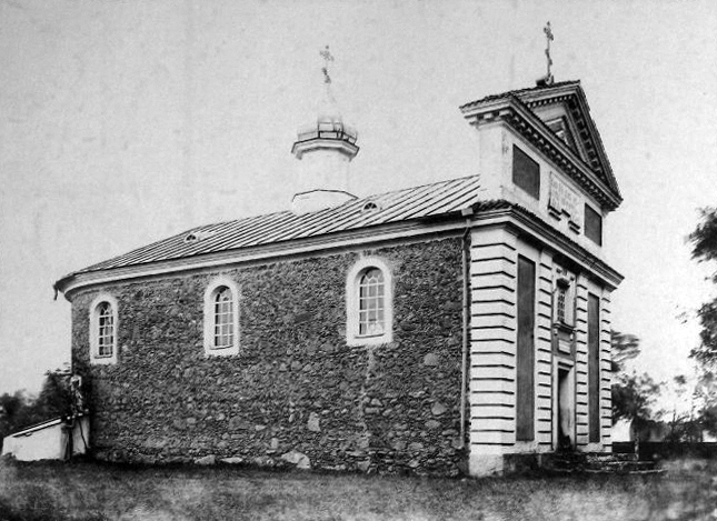 Беларуская (тарашкевіца): Самуйлавічы Дольныя (Samujłavičy Dolnyja). Царква